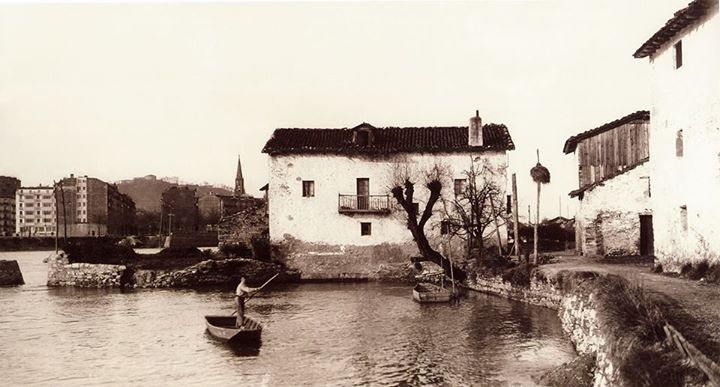 Errota Txiki 1920. urte inguruan.